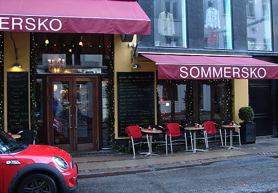 Café Sommersko, København